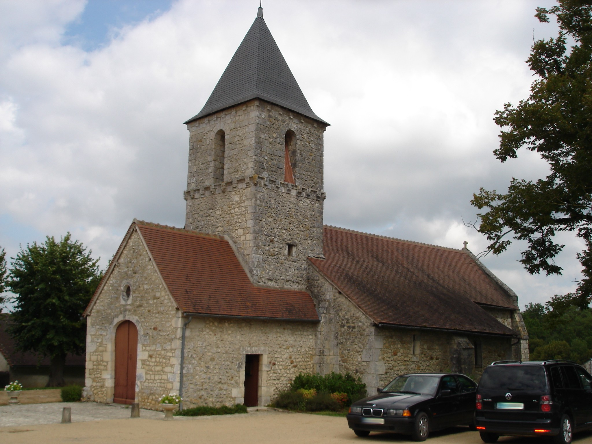 Sauzelles (36) : L'église.